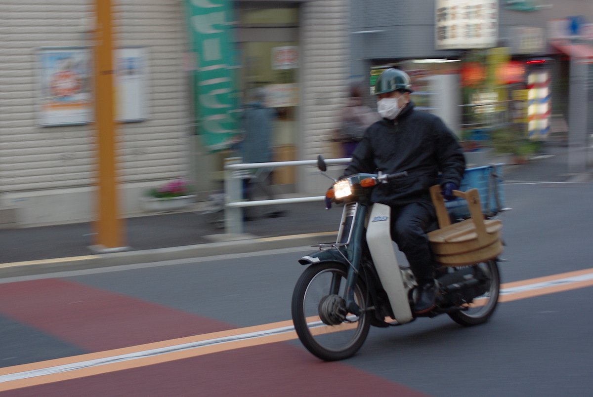 Yamaha V50